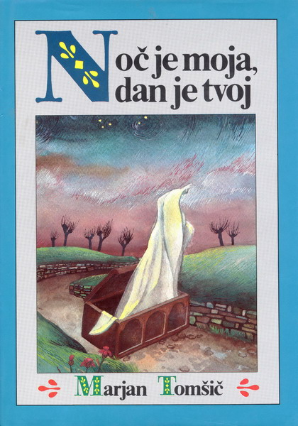 Naslovnica Noč je moja, dan je tvoj